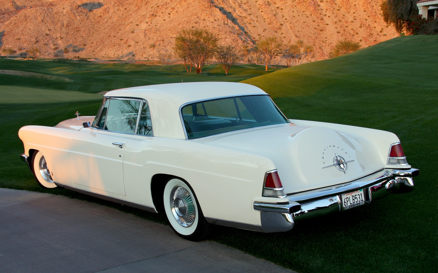 2011 Desert Classic, La Quinta, CA